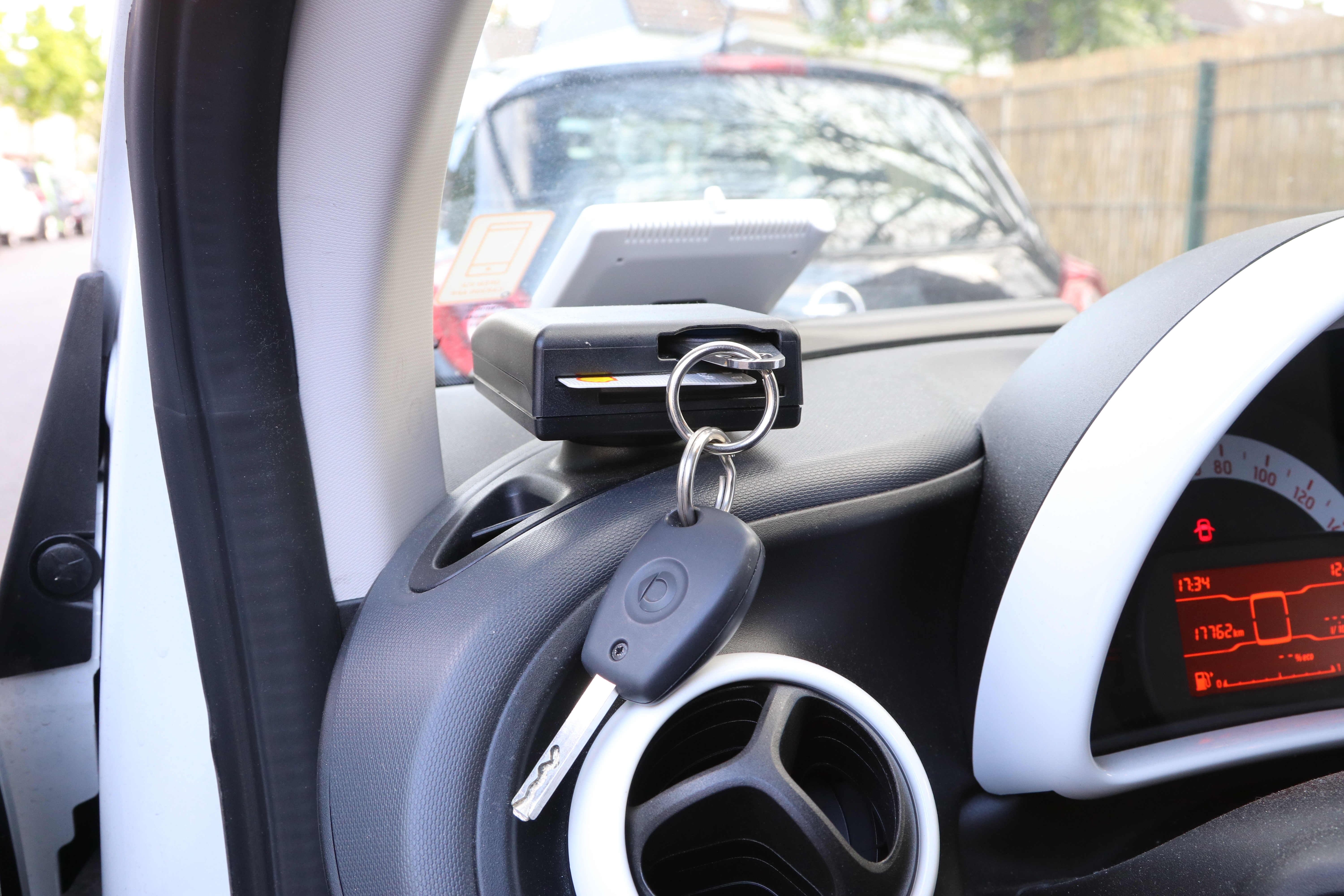 Schlüsselhalterung bei einem Car2Go-Smart. Wenn das Fahrzeug nicht ausgeliehen ist, muss der Fahrzeugschlüssel in dieser Halterung gesteckt sein.